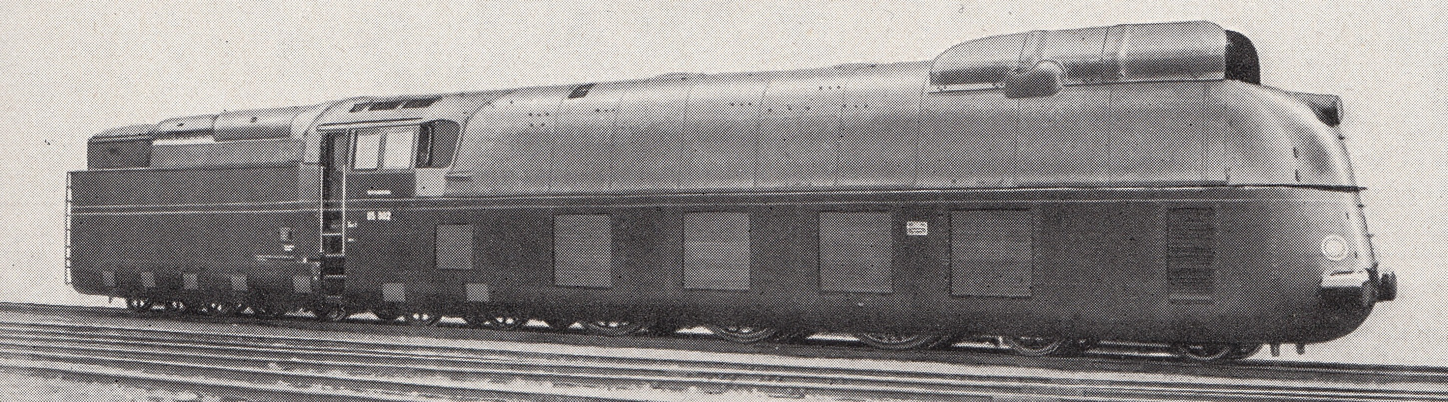 Dampflokomotive der Baureihe 05 der Deutschen Reichsbahn.